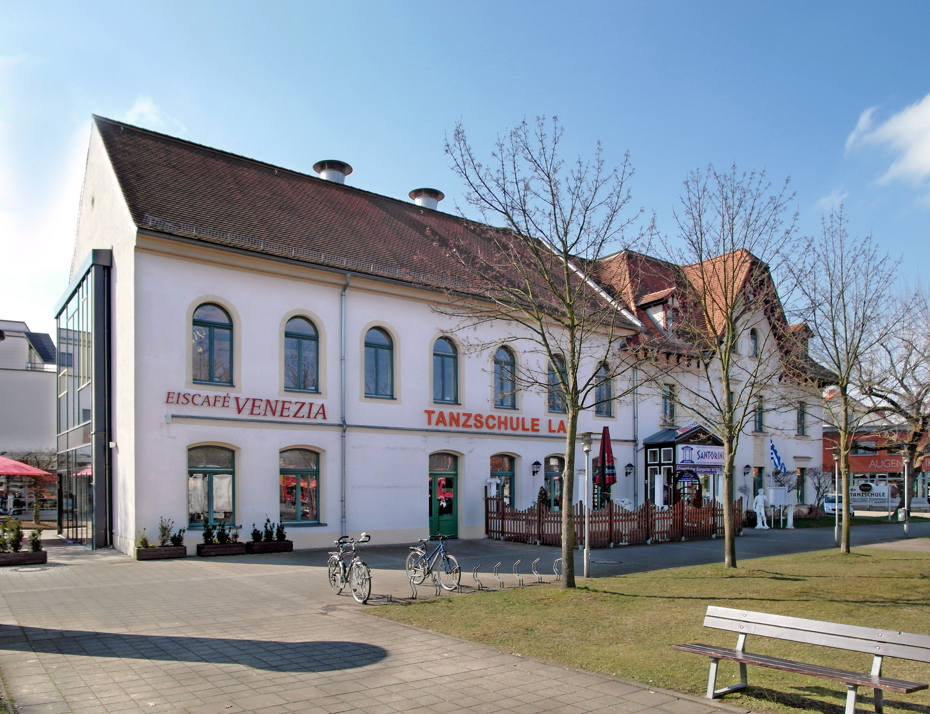 16.03.2016 01324 Dresden-Bühlau, Kurhaus Bühlau (GMP: 51.061799,13.854140), Ullersdorfer Platz (in DDR Siegfried-Rädel-Platz). Anfang 17. Jh. als Ausspanne eröffnet. Ab 1900 zu großem Tanzetablissement umgebaut. Im großen Saal fand am 06. und 07. 04.1946 der sächsische Vereinigungsparteitag der Kommunisten und Sozialdemokraten zur SED statt. Diesem Ereignis war eine 5,30 m hohe, aus der Werkstatt des Bildhauers Vinzenz Wanitschke stammende Gedenksäule aus Granit gewidmet, die im April 1961 vor dem Gebäude aufgestellt worden war. Der neue Eigentümer des Kurhauses hat sie nach der Wende abreißen lassen. [SAM3596.JPG]20160316100DR.JPG(c)Blobelt